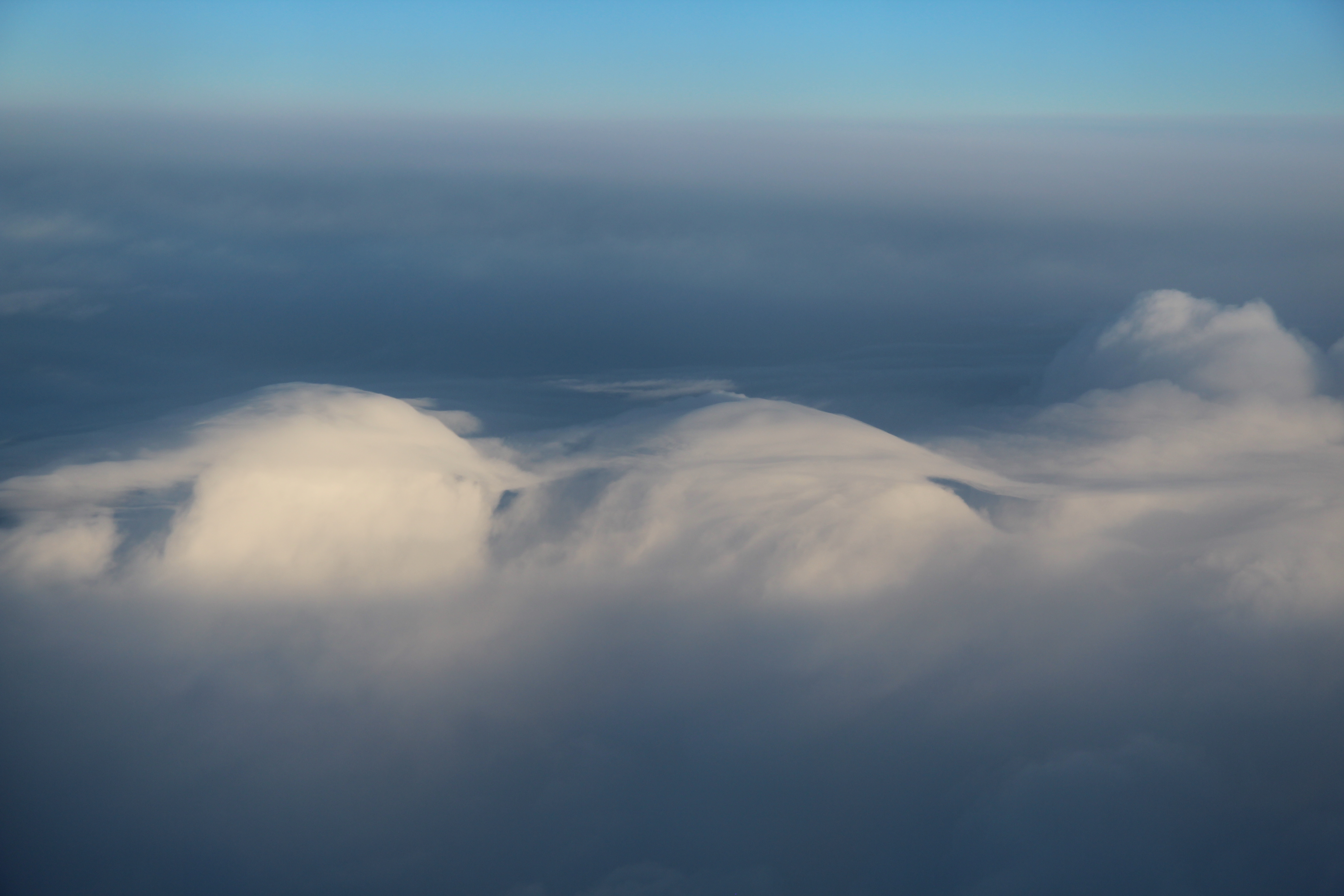 Cumulus mit großflächigen Schleiern (velum). Gesehen auf einem Flug von Madeira nach Frankfurt über dem Atlantik